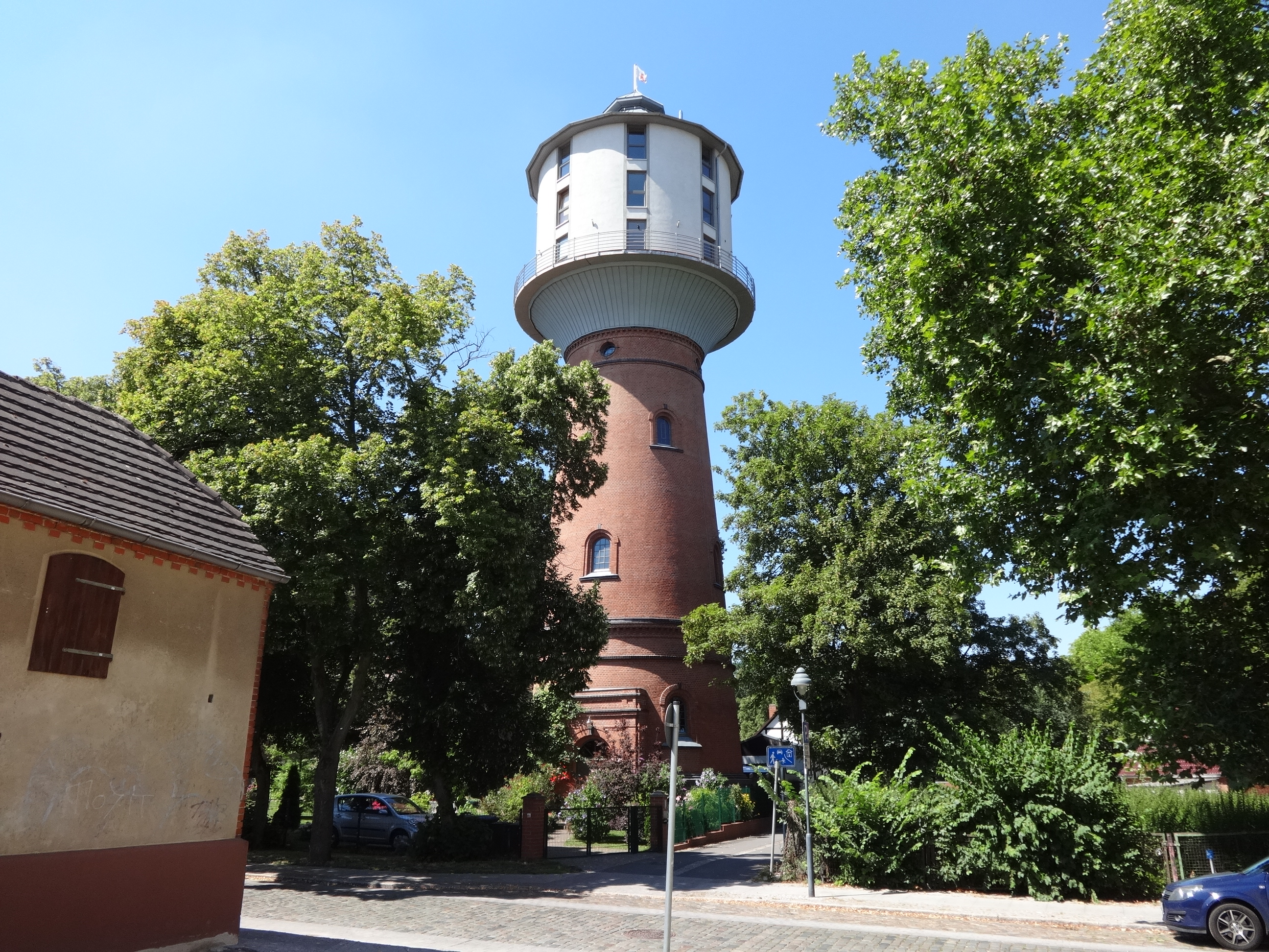 Denkmalgeschützter Wasserturm von 1898 in Nauen, Havelland, Brandenburg